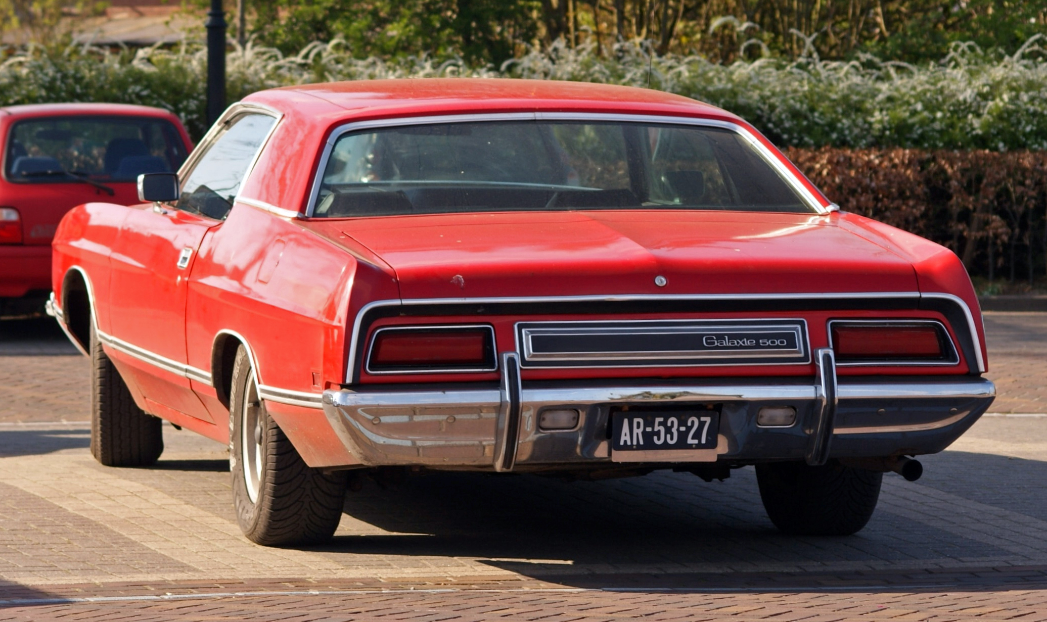 AR-53-27 Oranjeplein, Lunteren